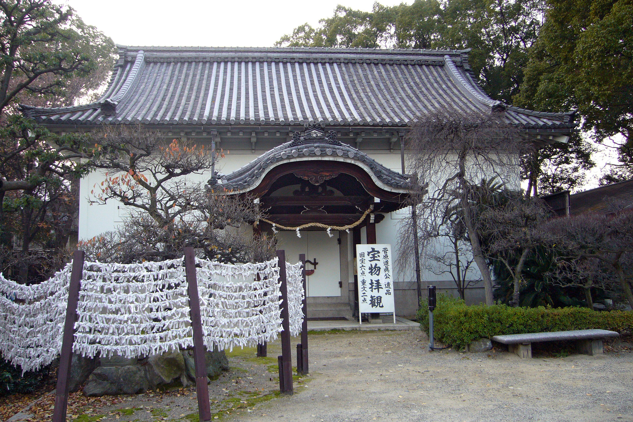 Domyoji-tenmangu in Fujiidera, Osaka, Japan